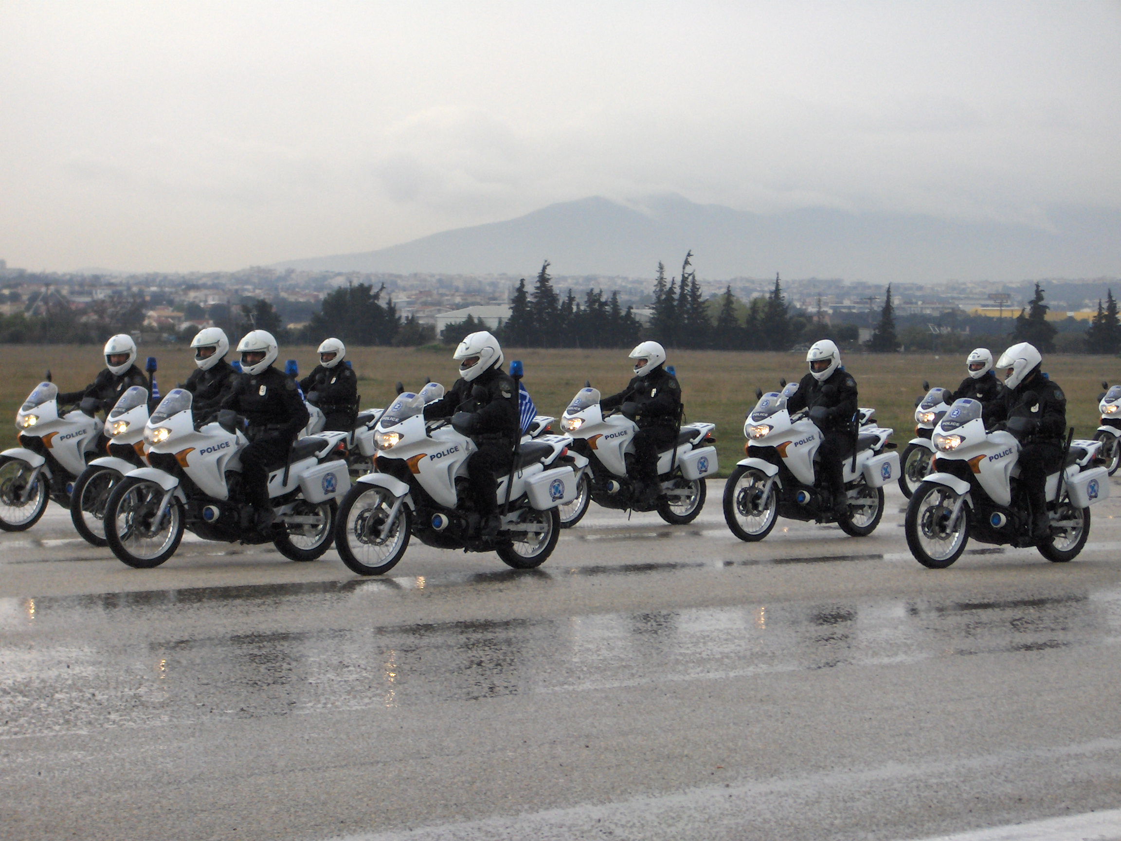 Greek police bikes